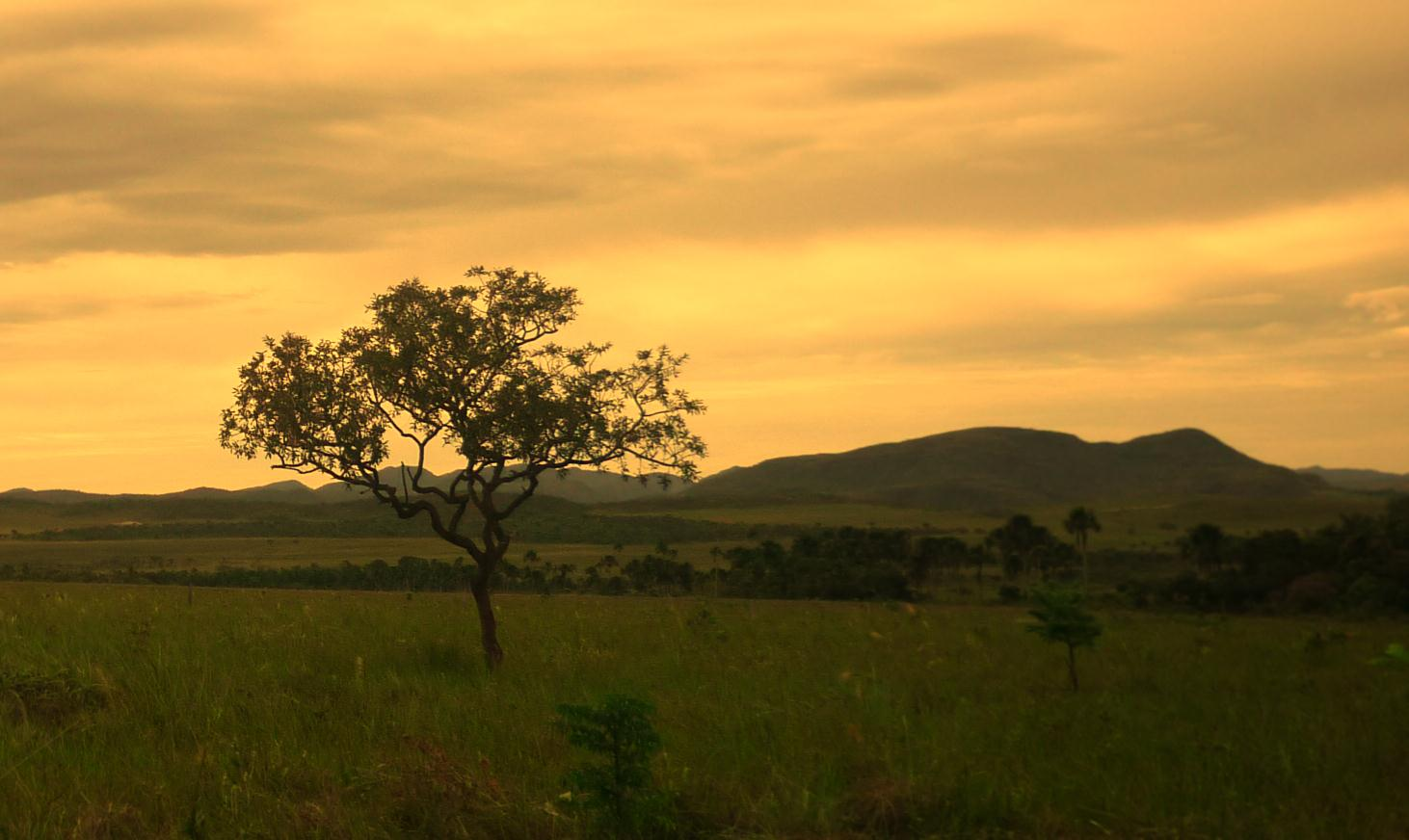 Pôr-do-sol em Alto Paraíso de Goiás, Brasil.